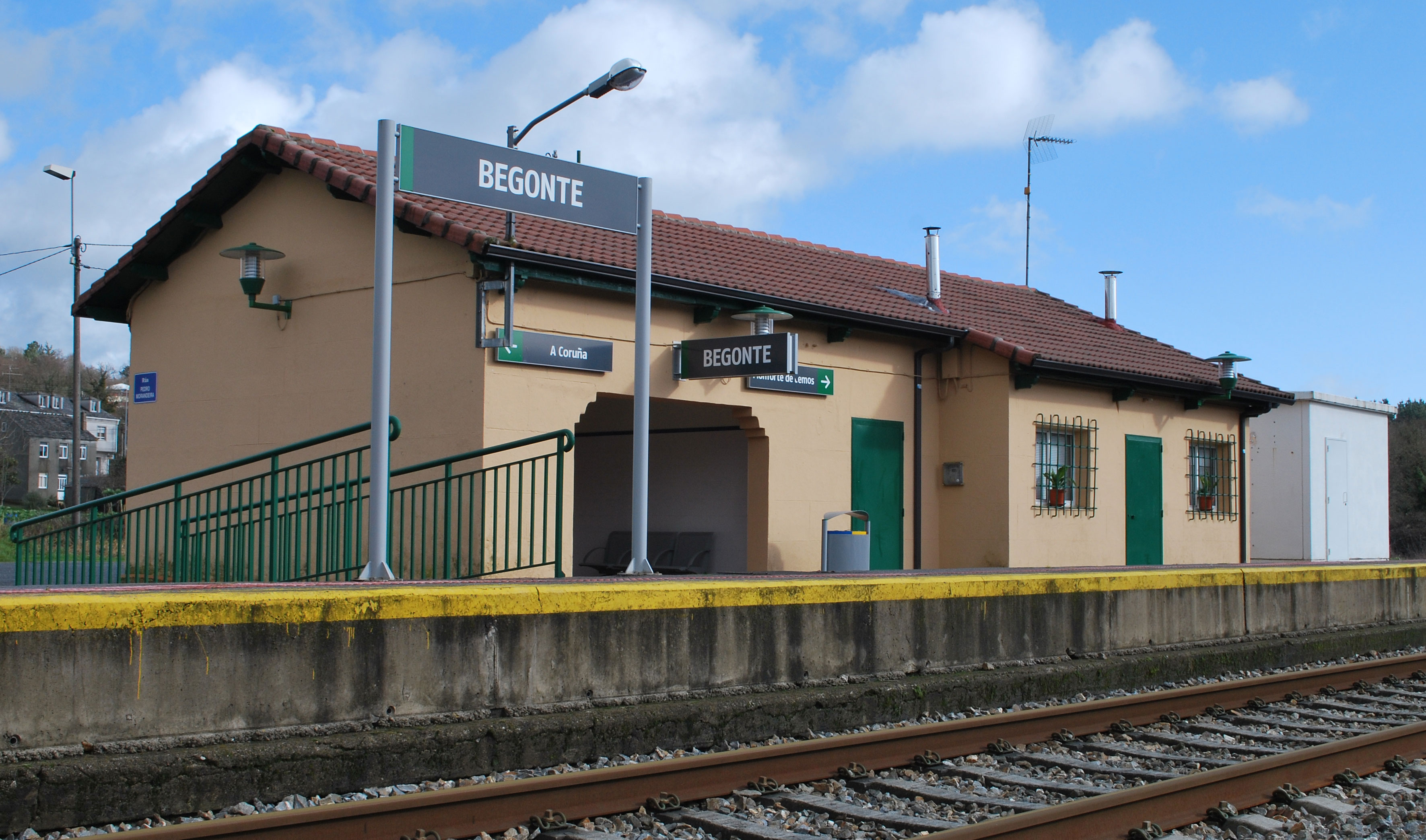 Estación de Begonte, Lugo Galiza Spain